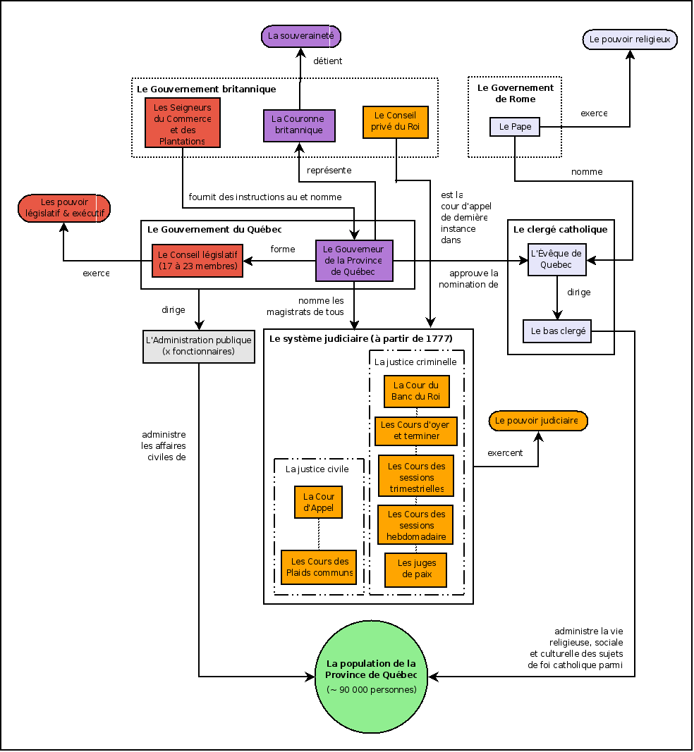 Diagramme de la constitution du Québec en 1775